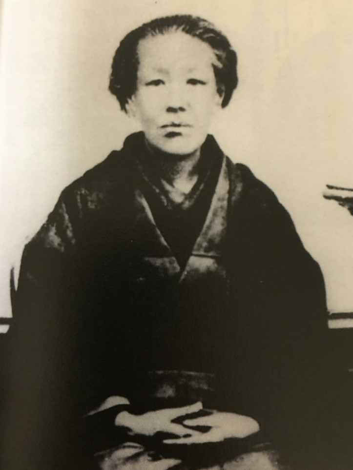 近藤つねの肖像写真。